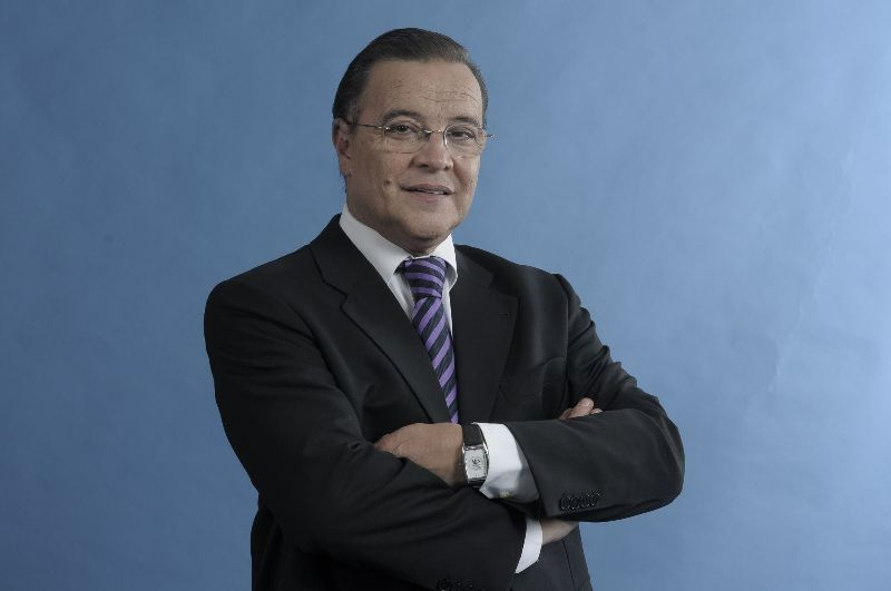 Jorge Traverso , periodista uruguayo.